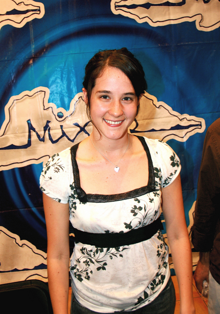 Mix Up Plaza Loreto